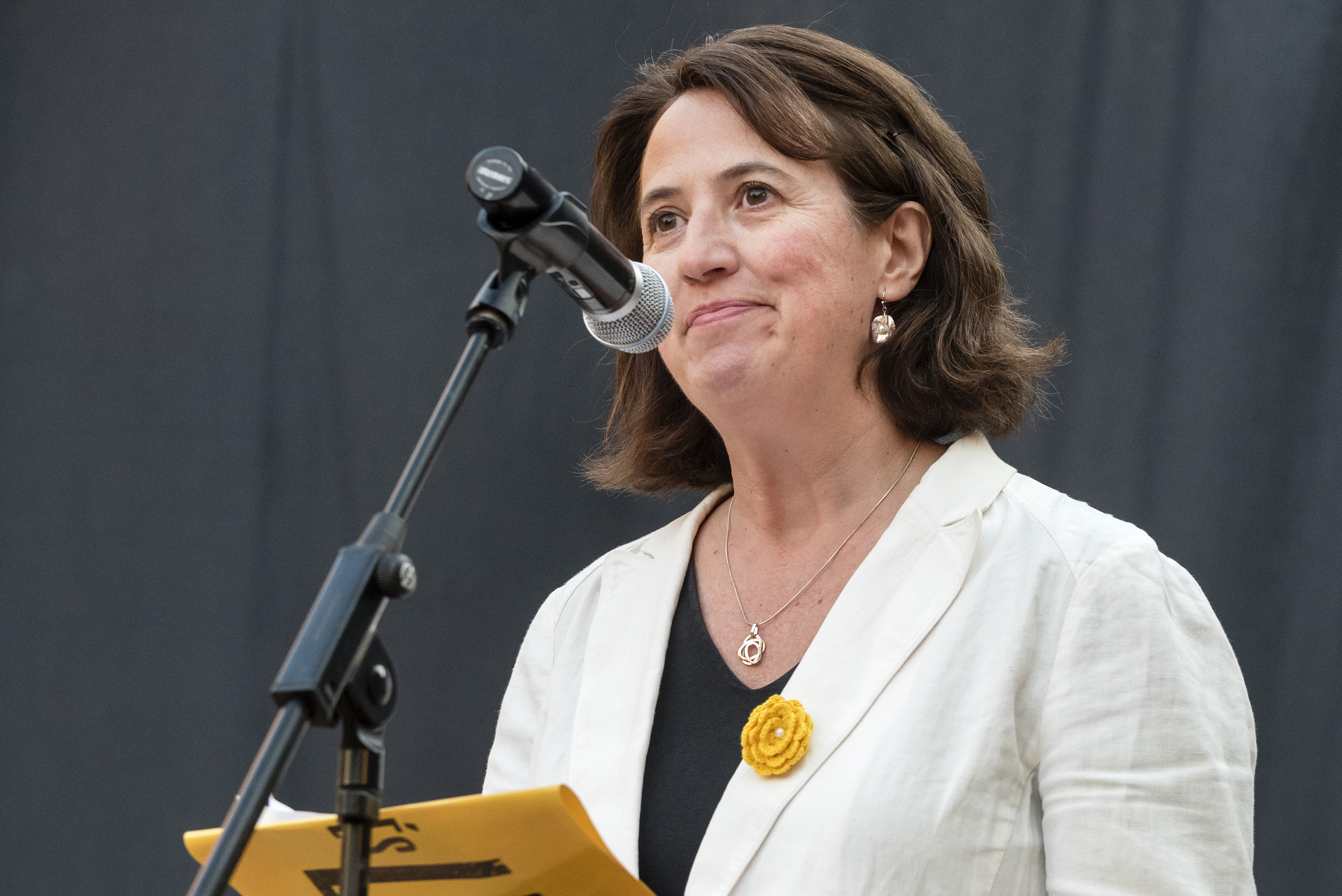 _DC77387